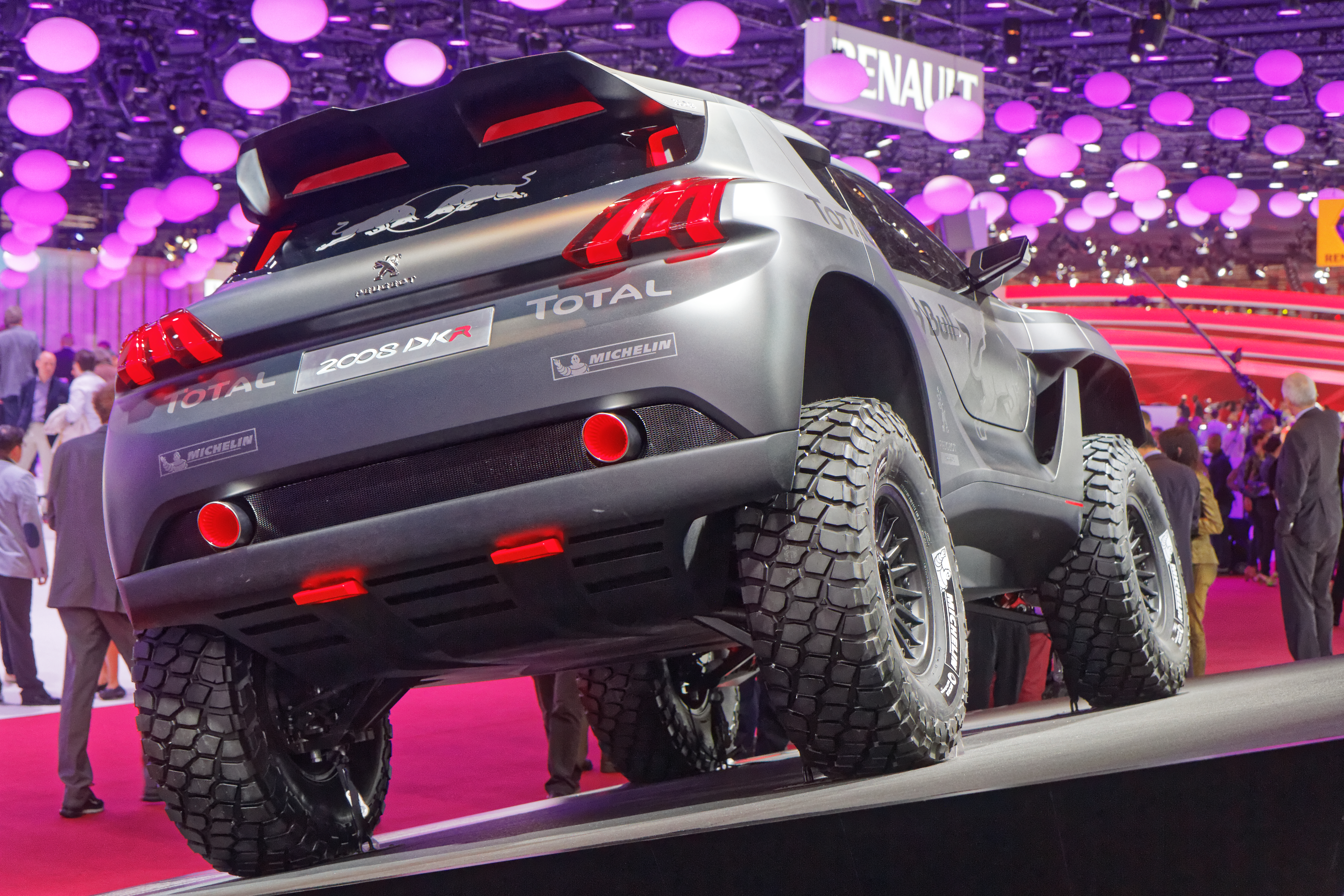 Une Peugeot 2008 DKR présentée lors du mondial de l'automobile de Paris 2014.